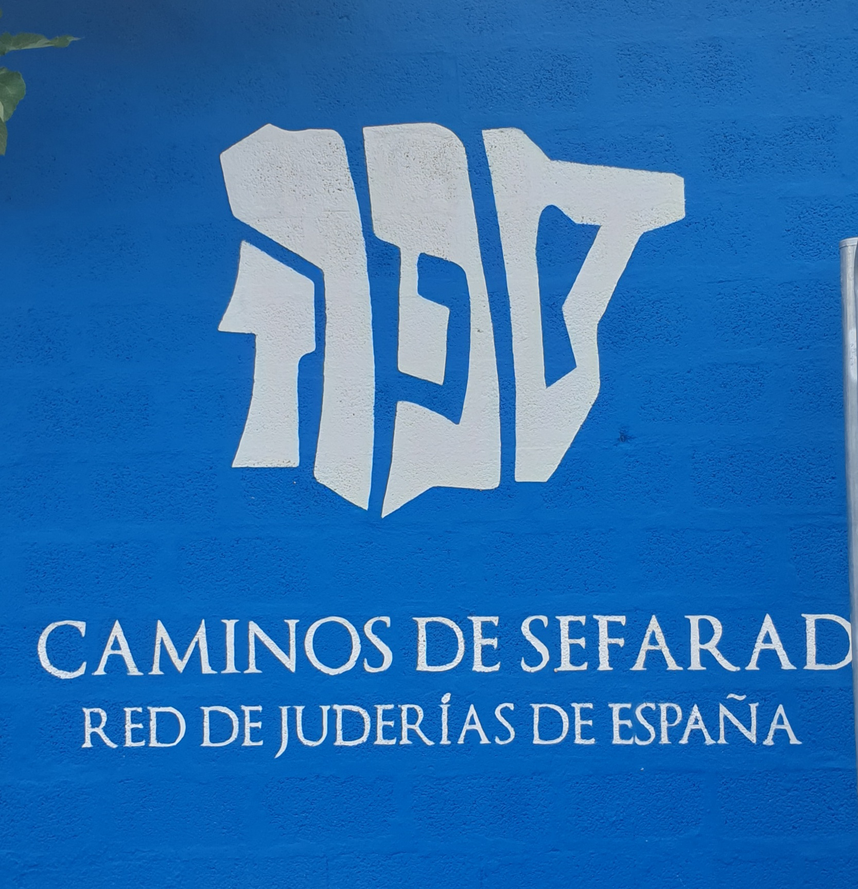 Mural con la simbología de la Red de Juderías de España en la Necrópolis judía de Lucena